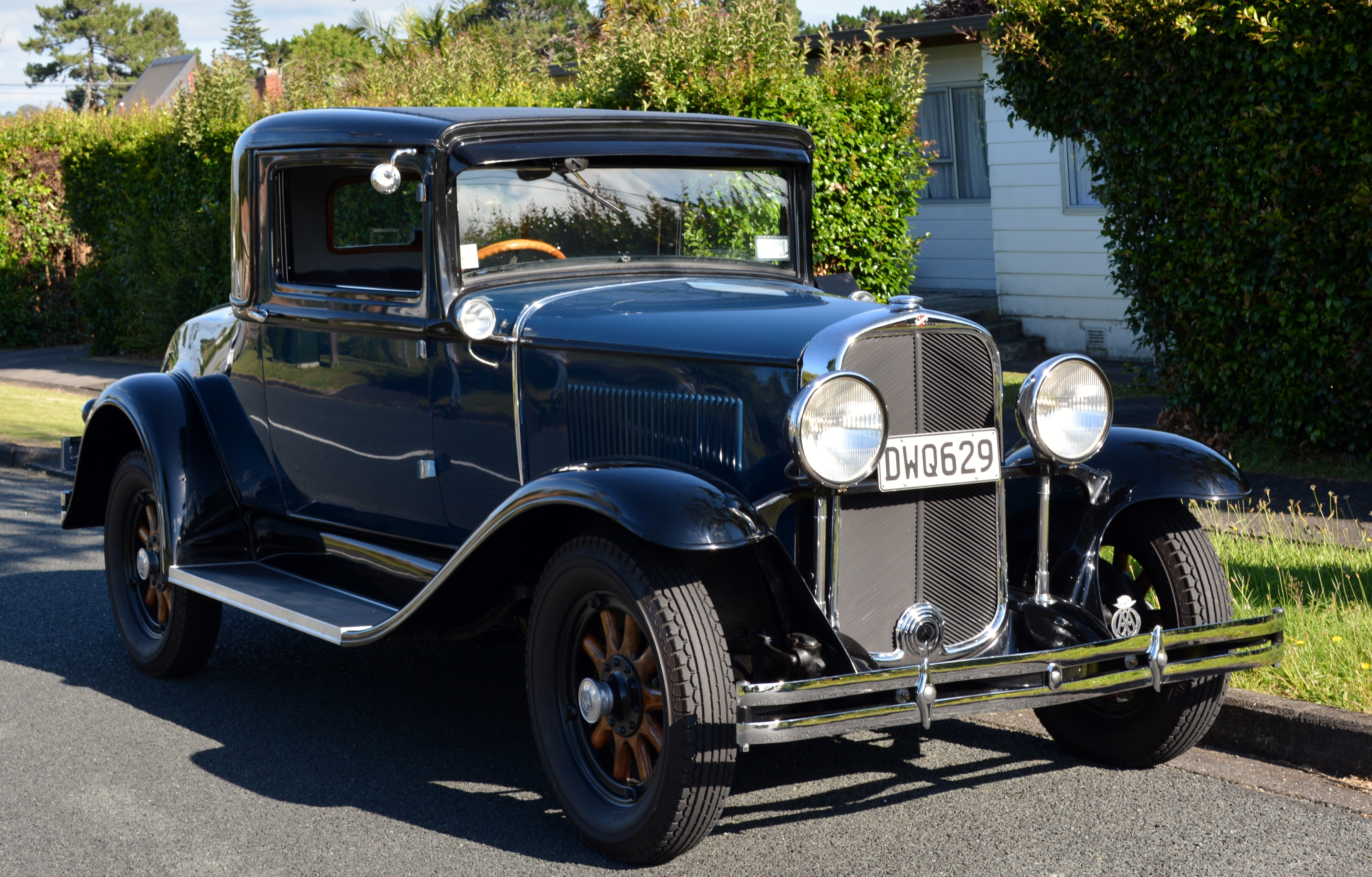 1930 Buick Marquette